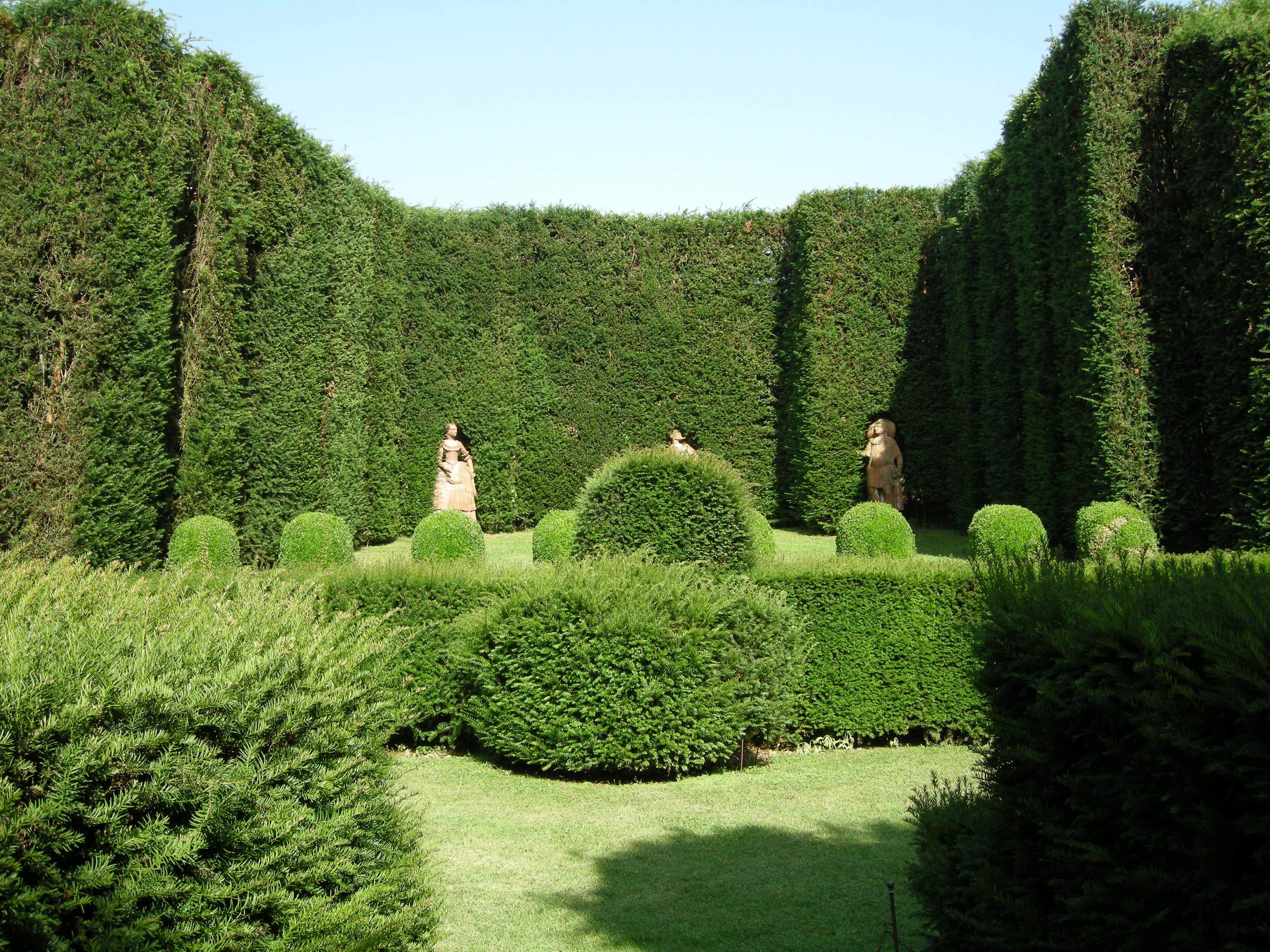 Villa reale di marlia, teatro di verzura